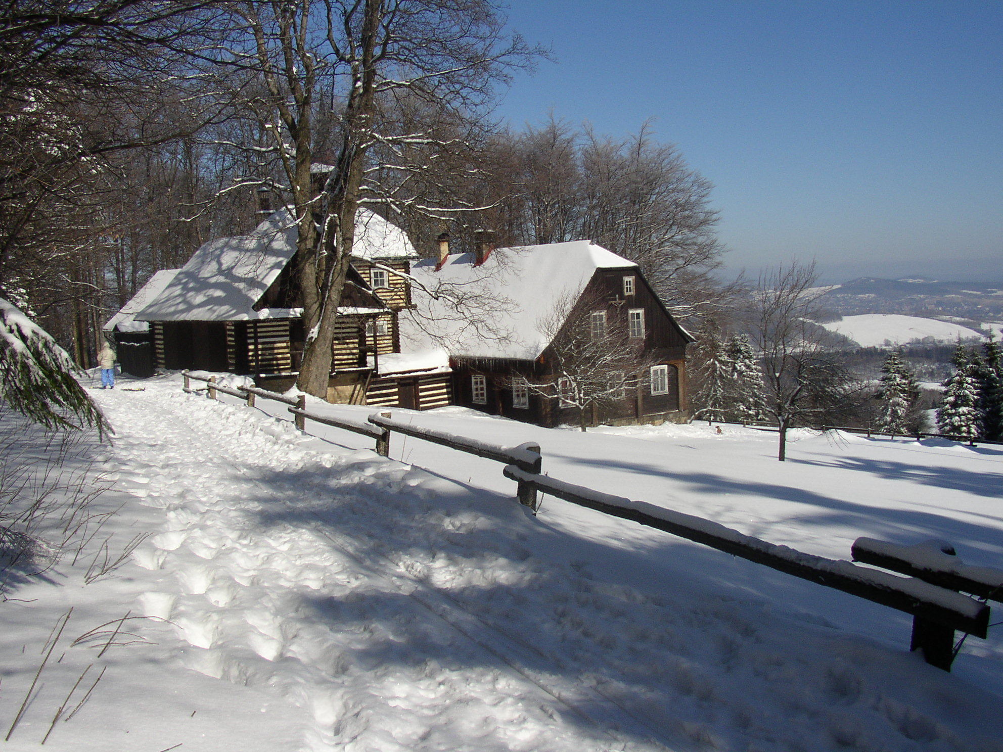 Ranch 7D, osada Jedlová,Jiřetín pod Jedlovou, okres Děčín Česká republika